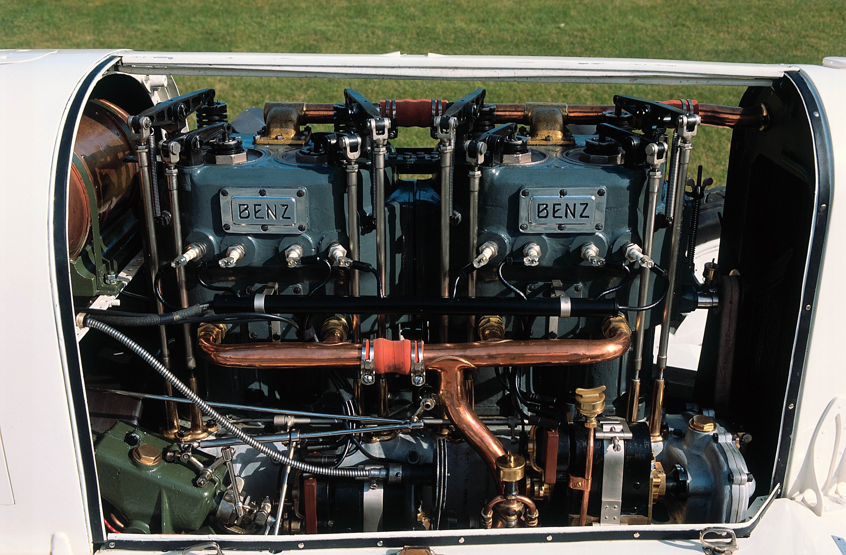 Bildbeschreibung: Blitzen-Benz Motor Quelle: Mediaseite der DaimlerChryslerAG Genehmigung: "Gern können Sie für Ihre Tätigkeit für die Wikipedia Inhalte der DaimlerChrysler Medienseiten verwenden. Dazu erkennen wir die Bedingungen nach GNU-FDL an. Das Angebot bezieht sich auch auf die vorhandenen Bilder." (Dr.Josef Ernst, Communications, DaimlerChrysler AG)